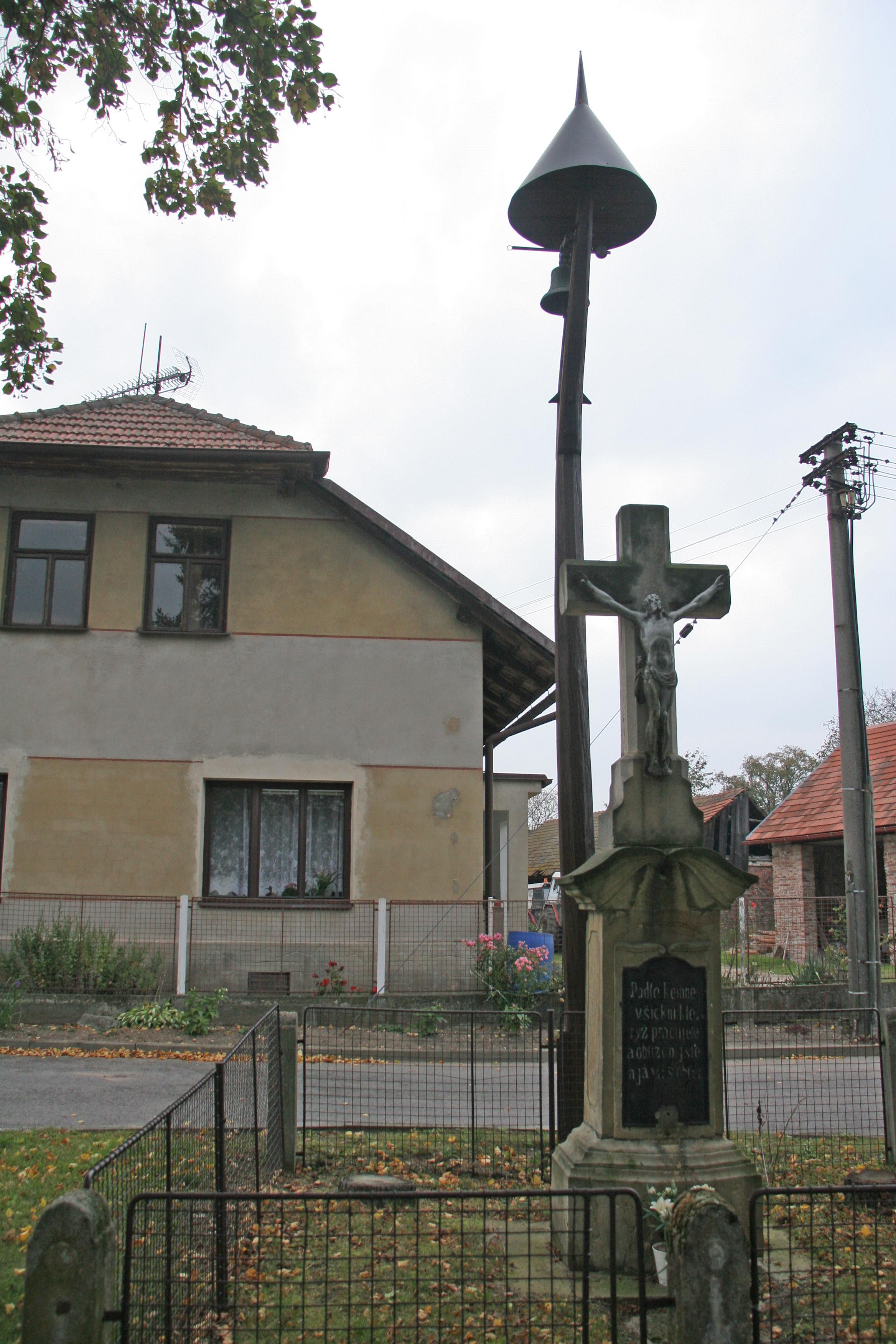 Hoděšovice kříž a zvonička